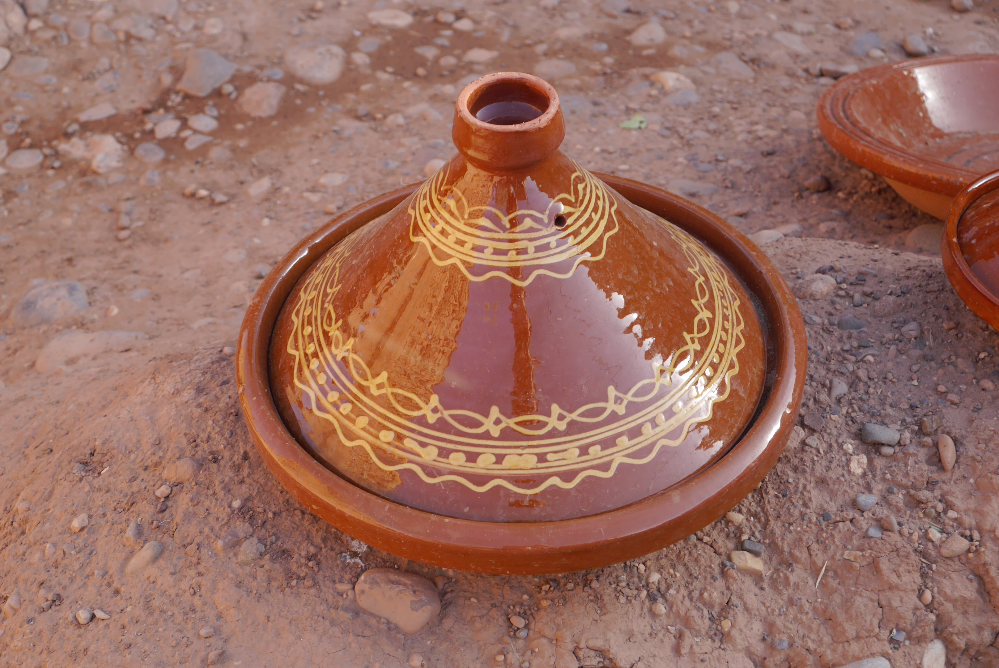 Tażin na przydrożnym stoisku